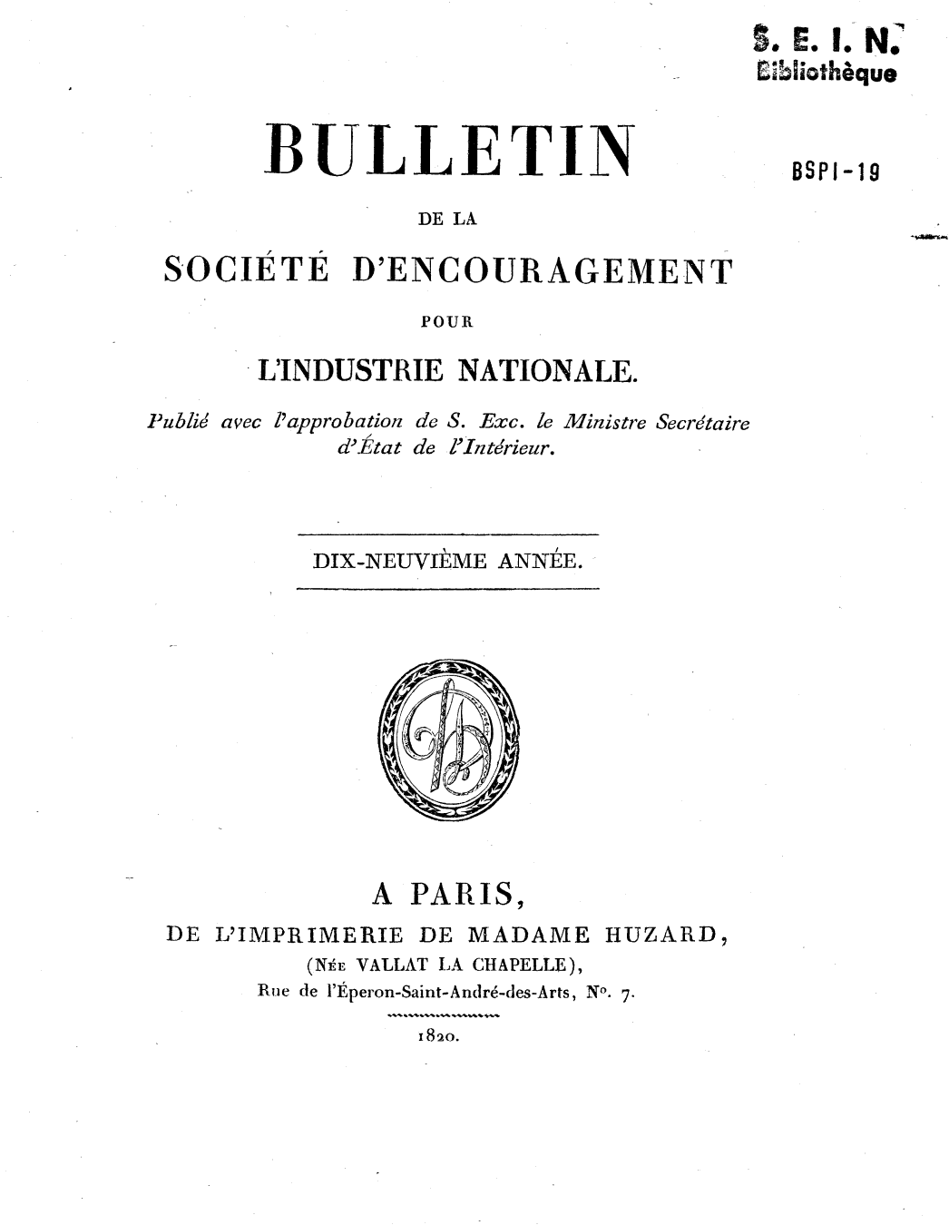 Couverture du bulletin de la Société d'Encouragement pour l'Industrie Nationale publié en 1820 (19ème année)